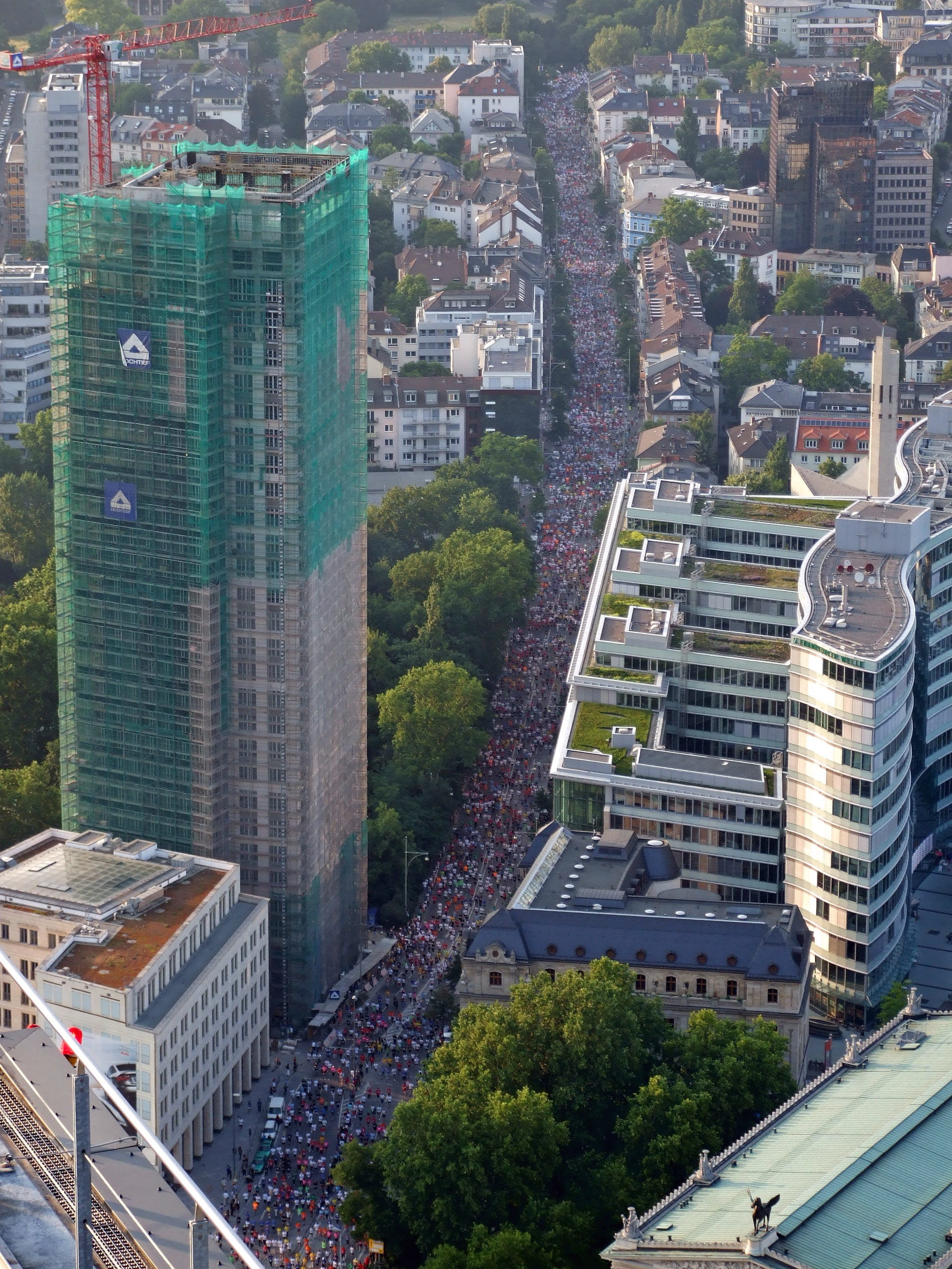 Hunderte von Teinehmer auf dem Reuterweg beim JPMorgan Chase Corporate Challenge 2007 in Ffm